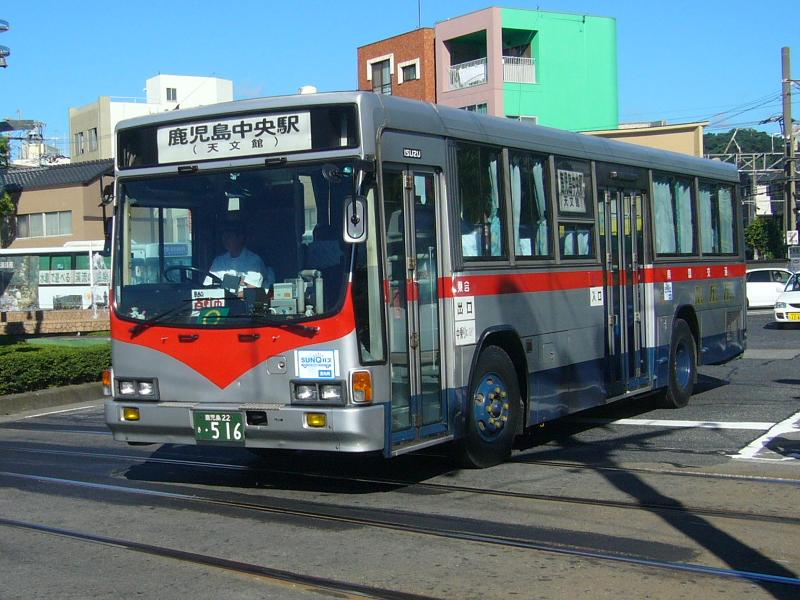 登録番号 鹿児島22き・516 南国交通所属 一般路線用車両 2006年7月29日 鹿児島駅前にて撮影